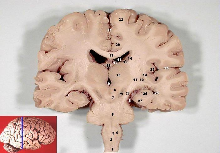 Frontal (Coronal) section of the brain Medulla spinalis Decussatio pyramidum Hilum nuclei olivaris inferioris Nucleus olivaris inferior Pons Arteria cerebri posterior (?) (Tractus cerebellorubralis) Nucleus ruber Ventriculus tertius Thalamus Capsula interna Putamen Capsula externa / Claustrum / Capsula extrema Nucleus caudatus (Corpus) Stria terminalis et Vena thalamostriata superior Lamina affixa / Ventriculus lateralis, Pars centralis Taenia choroidea / Plexus choroideus ventriculi lateralis Fornix, Crus Corpus callosum, Truncus Gyrus cinguli Fissura longitudinalis cerebri Gyrus frontalis superior (?) Insula Sulcus lateralis Ventriculus lateralis, Cornu temporale Hippocampus Gyrus parahippocampalis Crus cerebri Substantia nigra (font: arial black, size: 8)